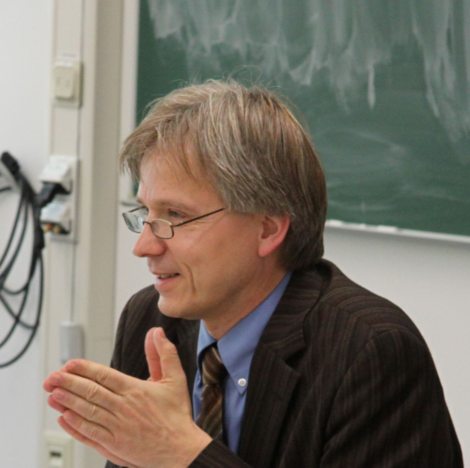 Jan Hermelink, Professor für Praktische Theologie/Pastoraltheologie an der Universität Göttingen, während eines Vortrags zum Thema Theologische Kompetenz – Wandel eines umstrittenen Begriffs. Ausschnitt aus Jan Hermelink.jpg.